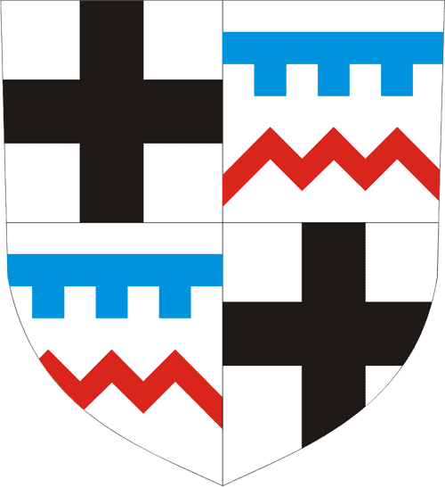 Teutonic Order - Coat of Arms of the Grandmaster Wappen des Hochmeisters des Deutschen Ordens Otto von Kerpen